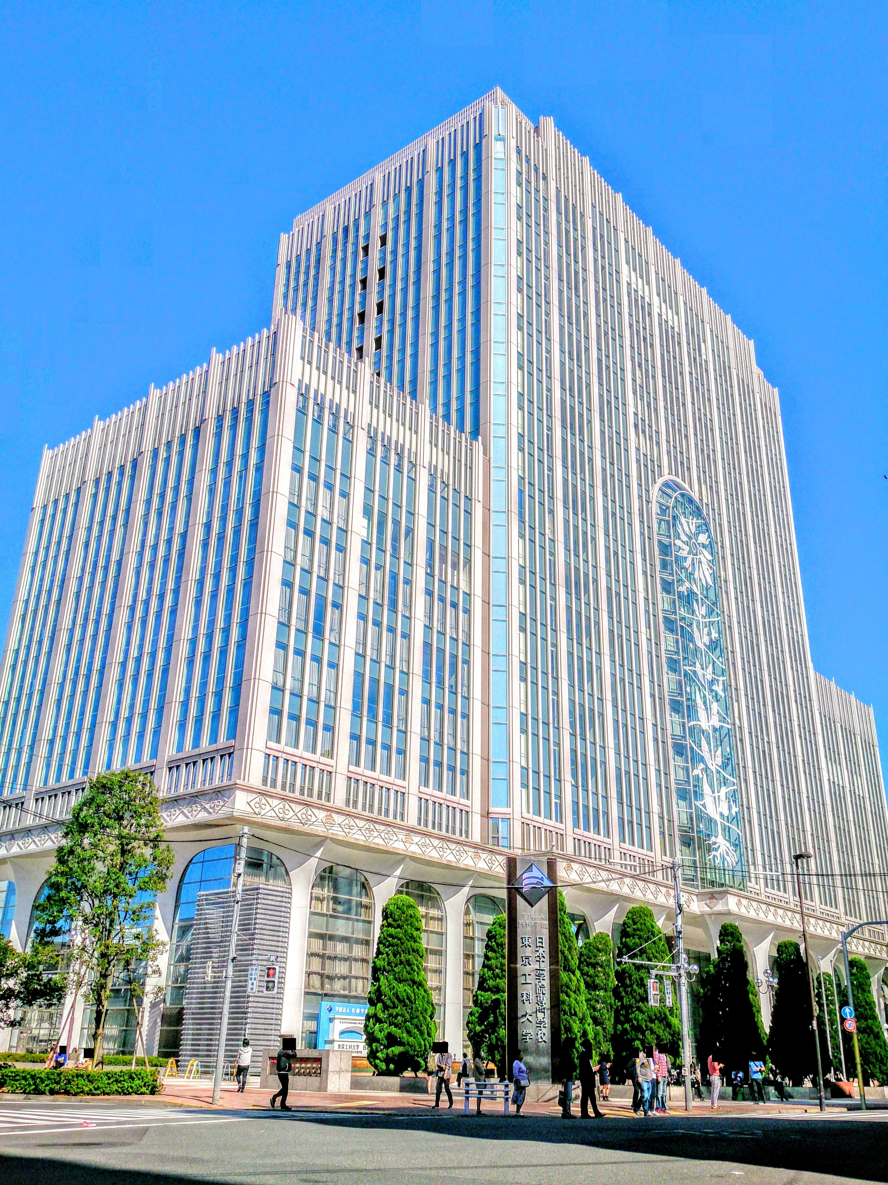 日本工学院専門学校の3号館（本館）